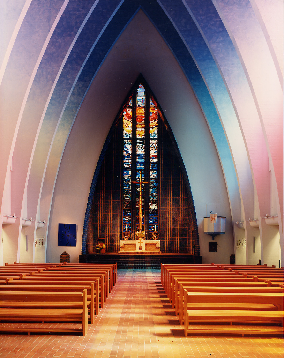 Kirche_am_Hohenzollern_Kirchenraum